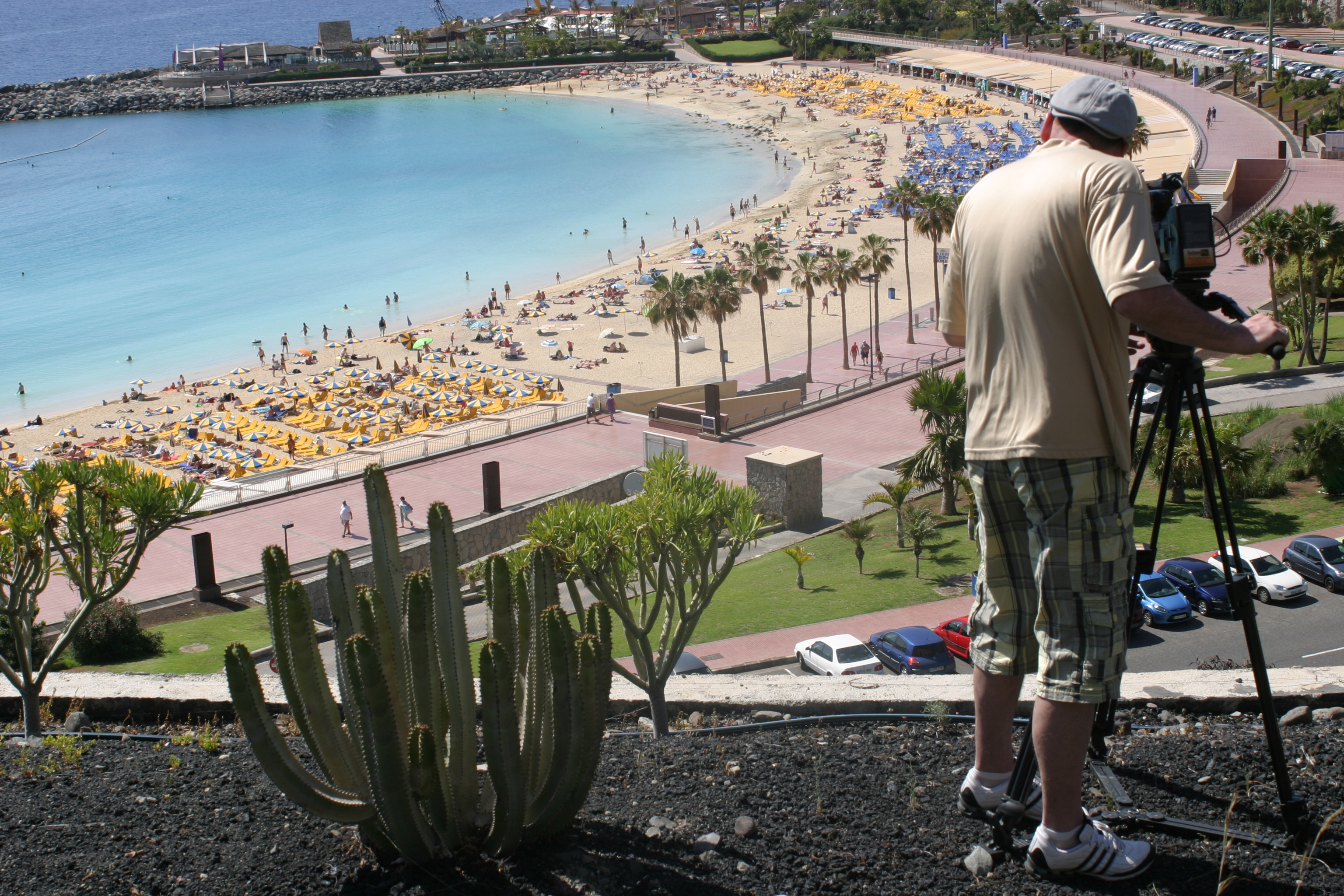 Dreharbeiten zum Reisekino - Film Gran Canaria 2013 an der Playa de los Amadores